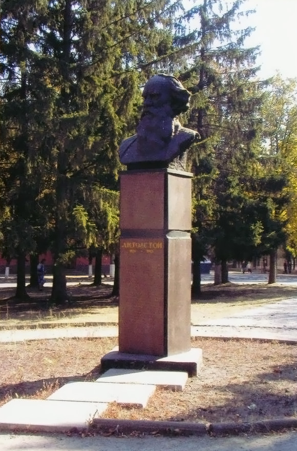 Pam'yatnik L.M. Tolstoy